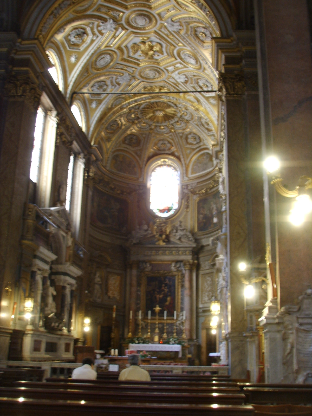 Santa Maria dell'Anima church, inside view in Rome, Italy